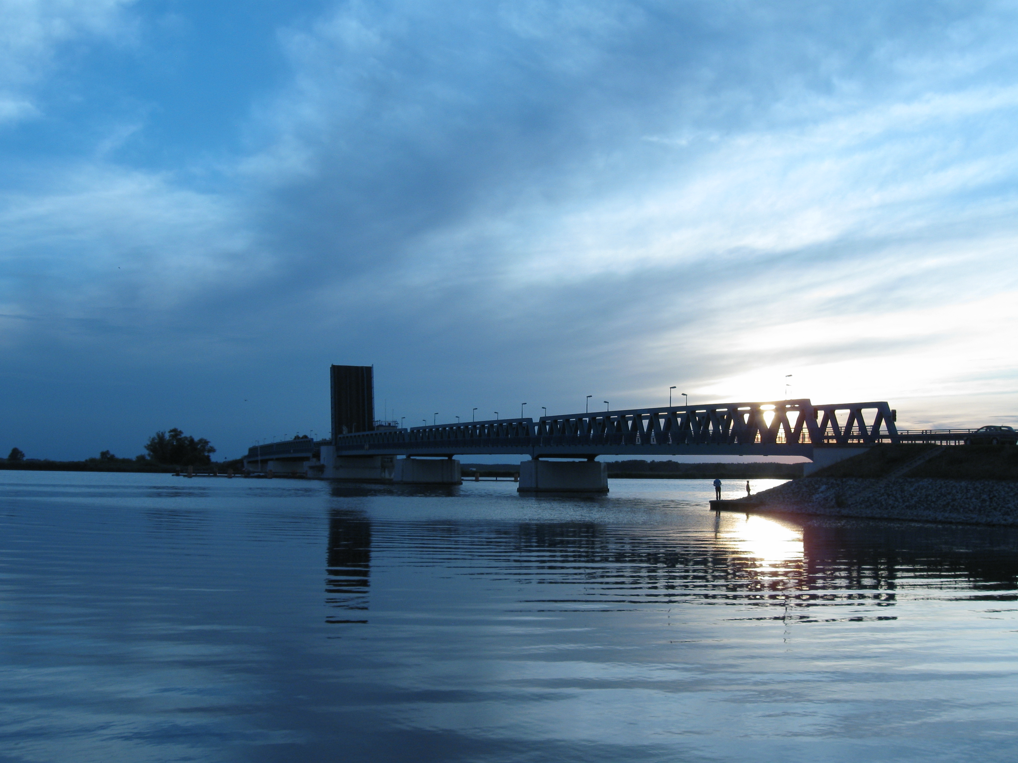 Die geöffnete Zecheriner Brücke im Abendlicht mit Blick in Richtung Festland.